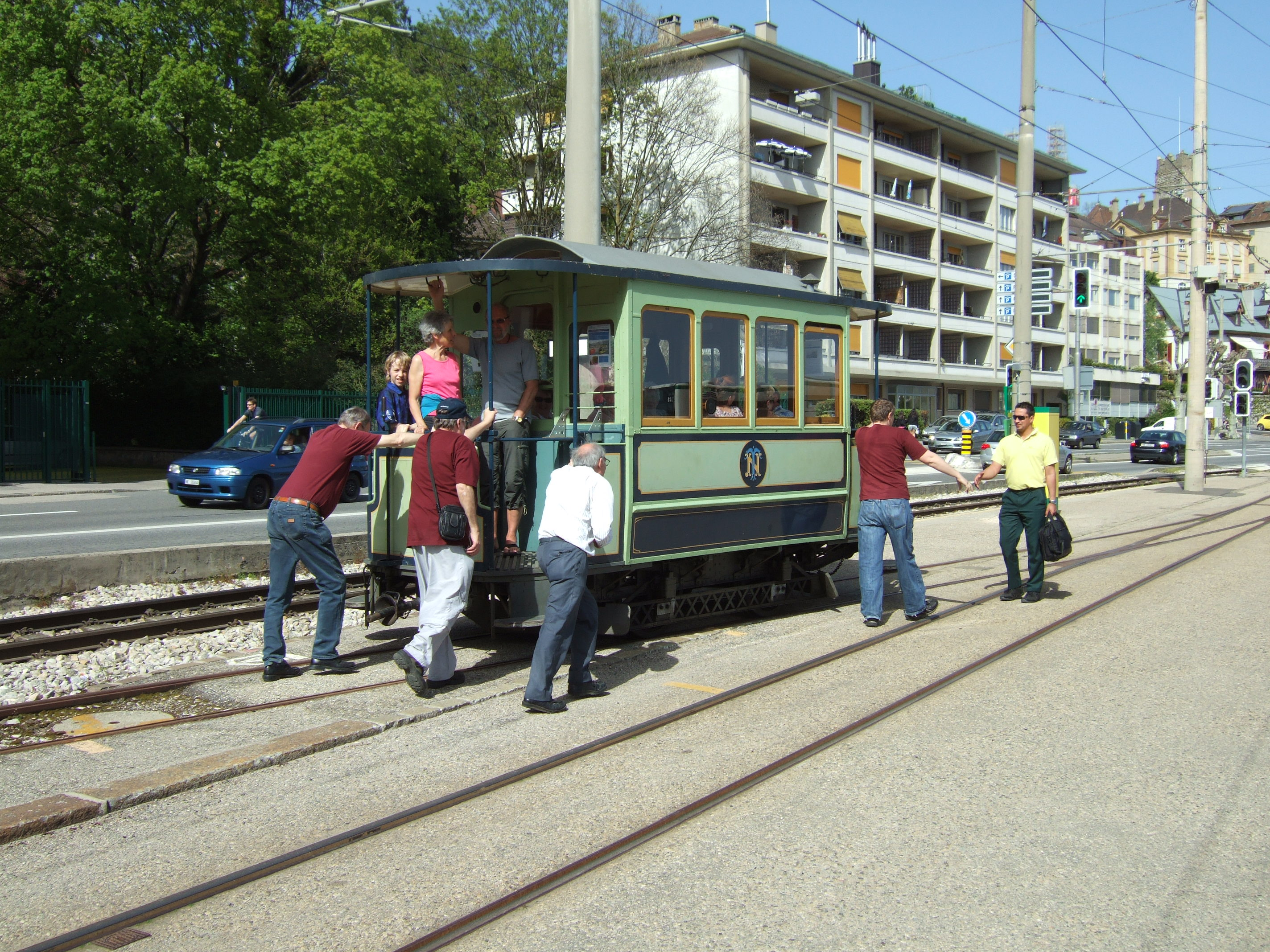 Photo. Trams aux Fils. Remorque 1, année de construction 1894, constructeur SIG Neuhausen, longueur 5.55m, largeur 1.95m, poids 1850Kg, 12 places assises et 18 places debouts soit un total de 30 passagers, pas d'indication sur le nombre de kilomètres effectués, elle a circulé jusqu'en 1964, véhicule en état de marche.